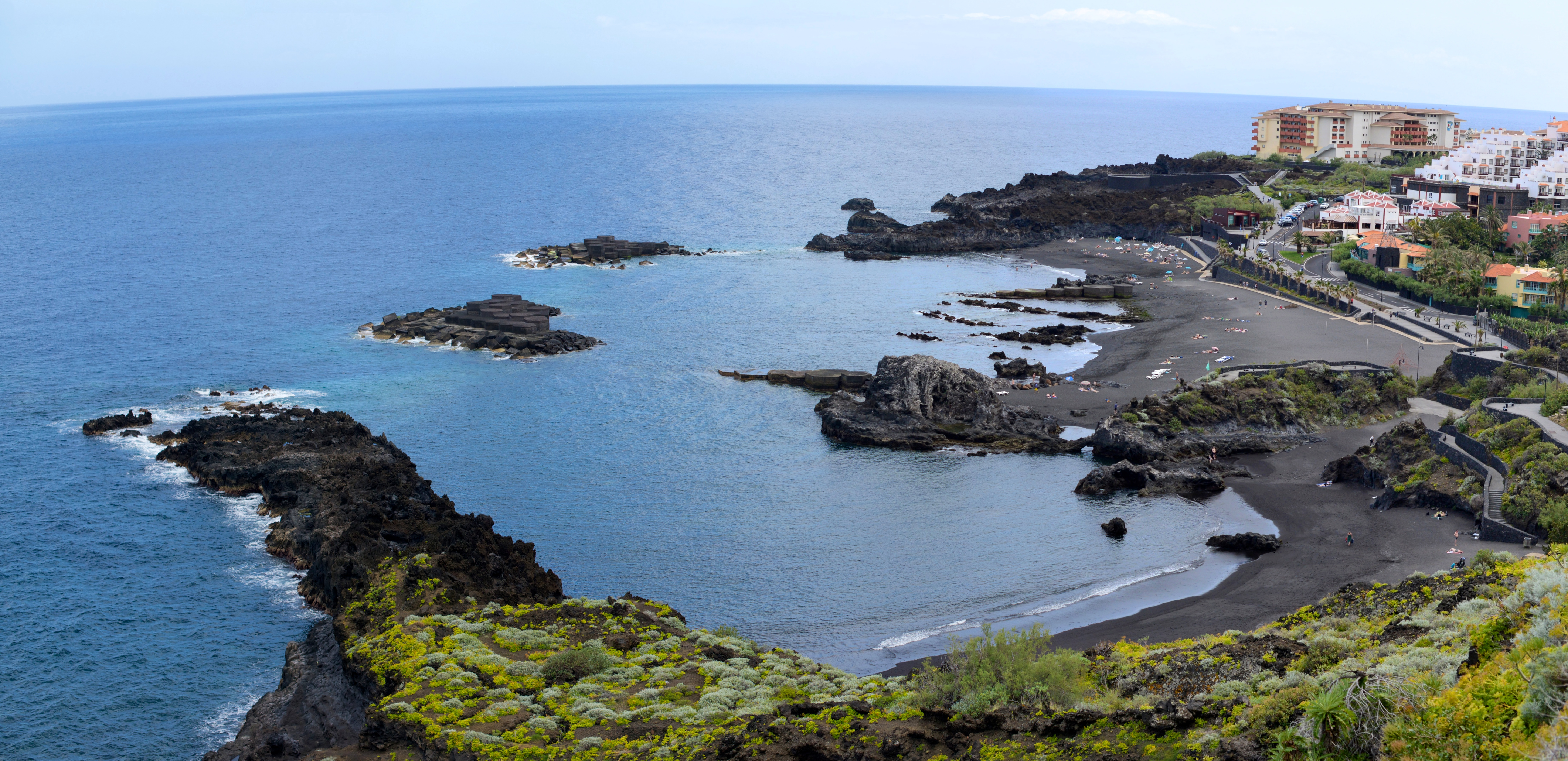 Panorama des Strandes von Los Cancajos